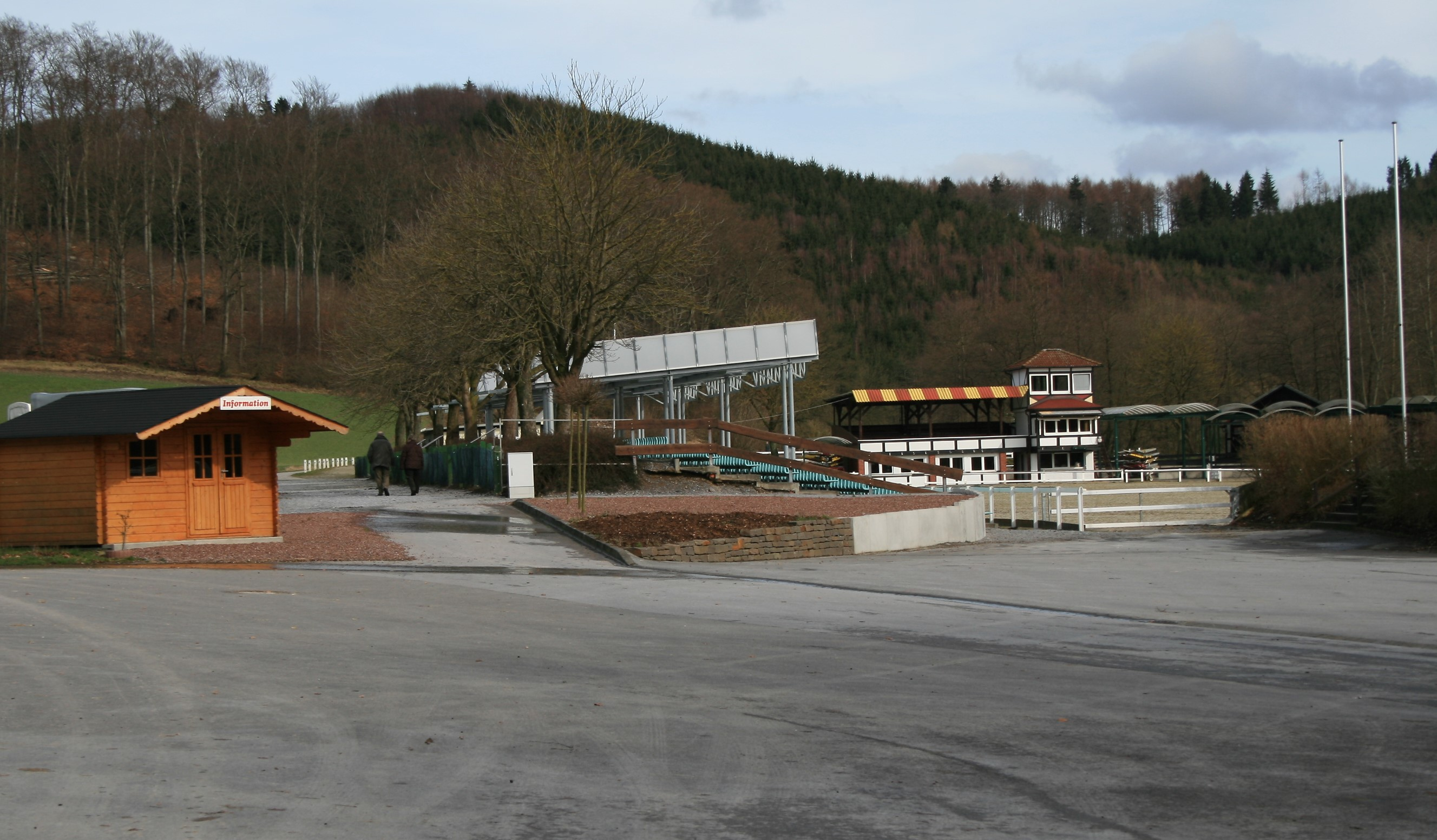 Eingangsbereich Springstadion auf dem Turnierplatz in Balve-Wocklum.